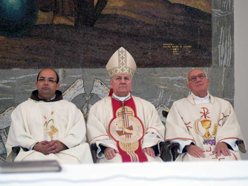 Biskup Franjo Komarica u Biloj